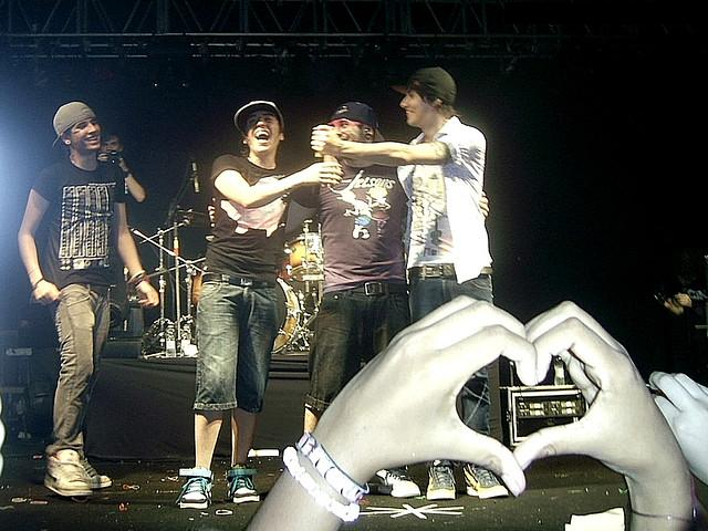 Banda Cine em um show em 2009 no Excalibur em São Paulo.